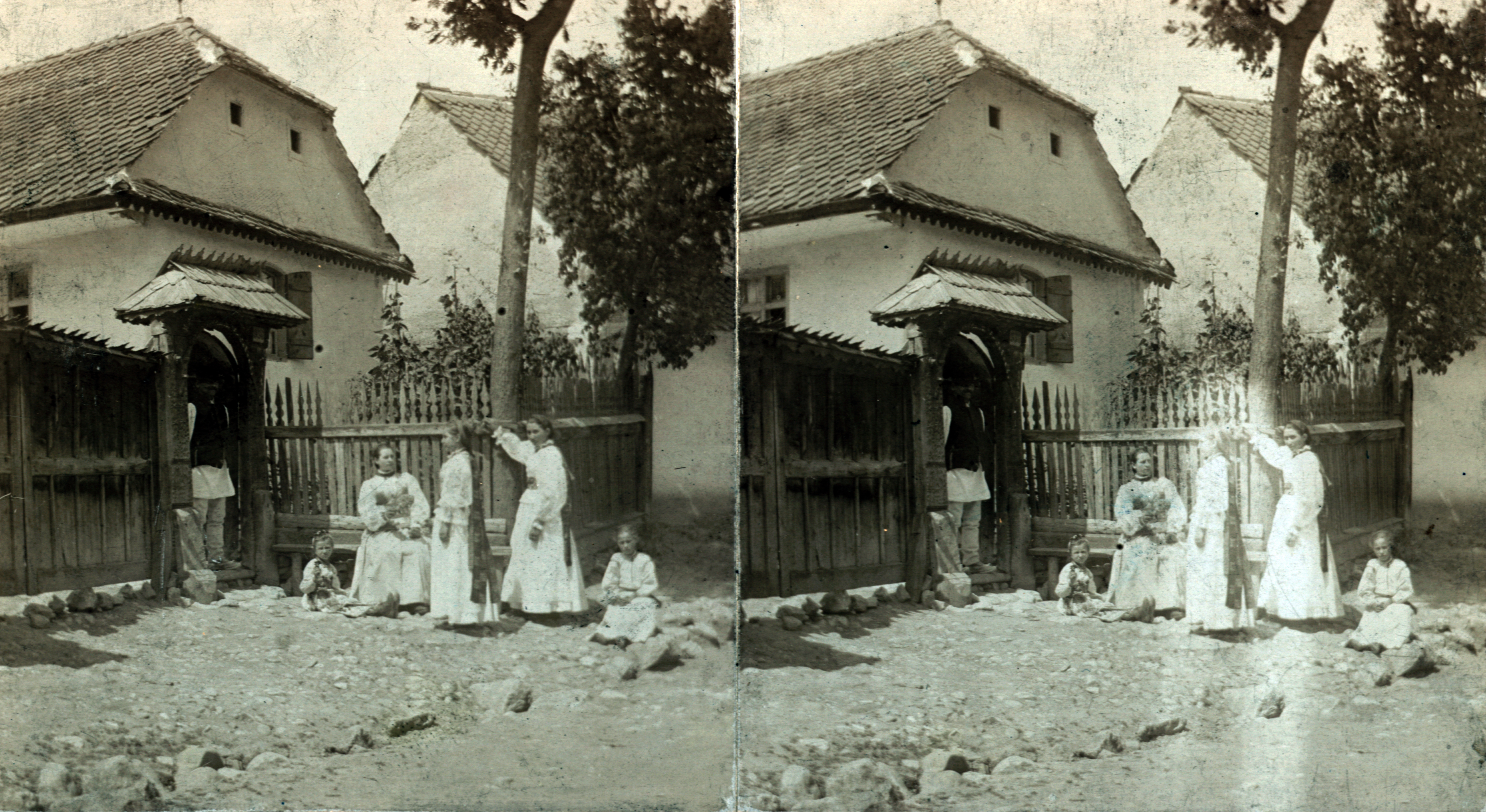 Csernátfalu (egykor önálló, ma a város része), csángó leányok. Location: Romania, Transylvania Tags: stereophoto Title: Csernátfalu (egykor önálló, ma a város része), csángó leányok.